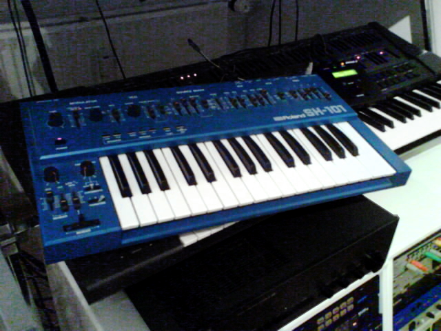 Og de sjove synths - Roland SH-101 og Droid-3